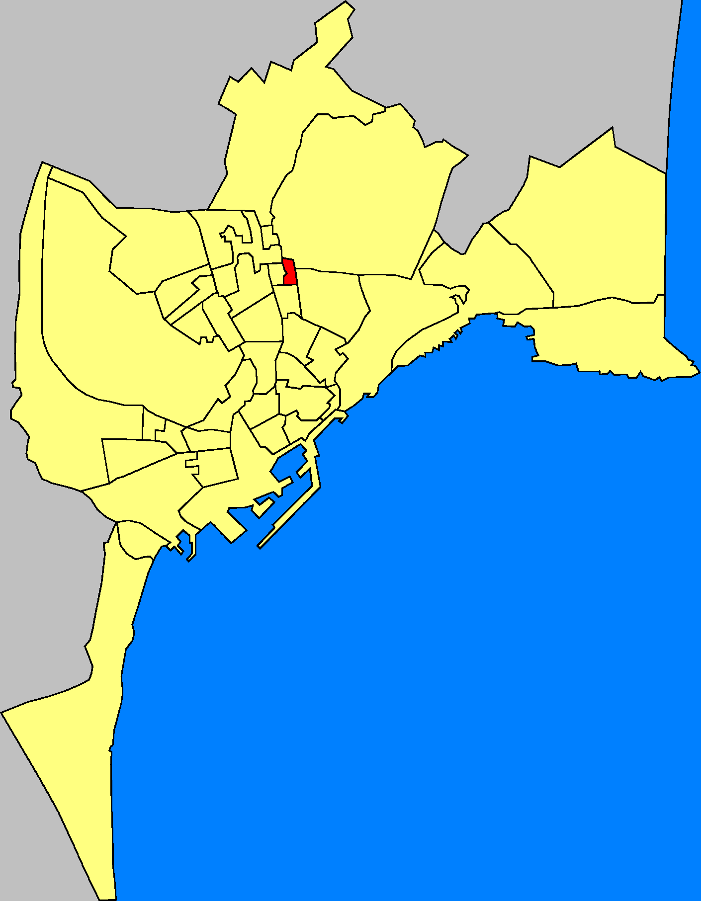 Barrios de la ciudad de Alicante